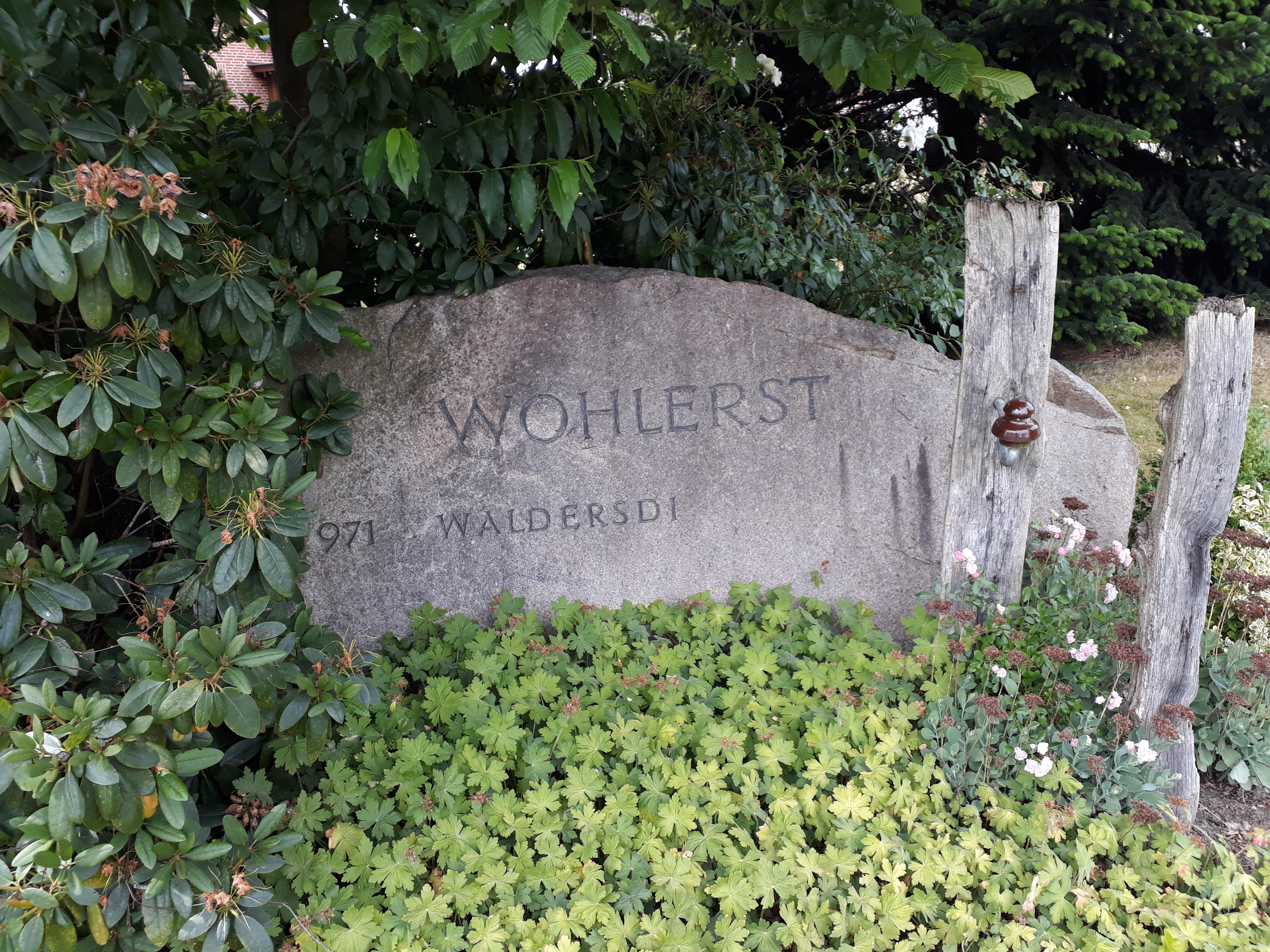 Gedenkstein in Wohlerst, Brest, Nds.